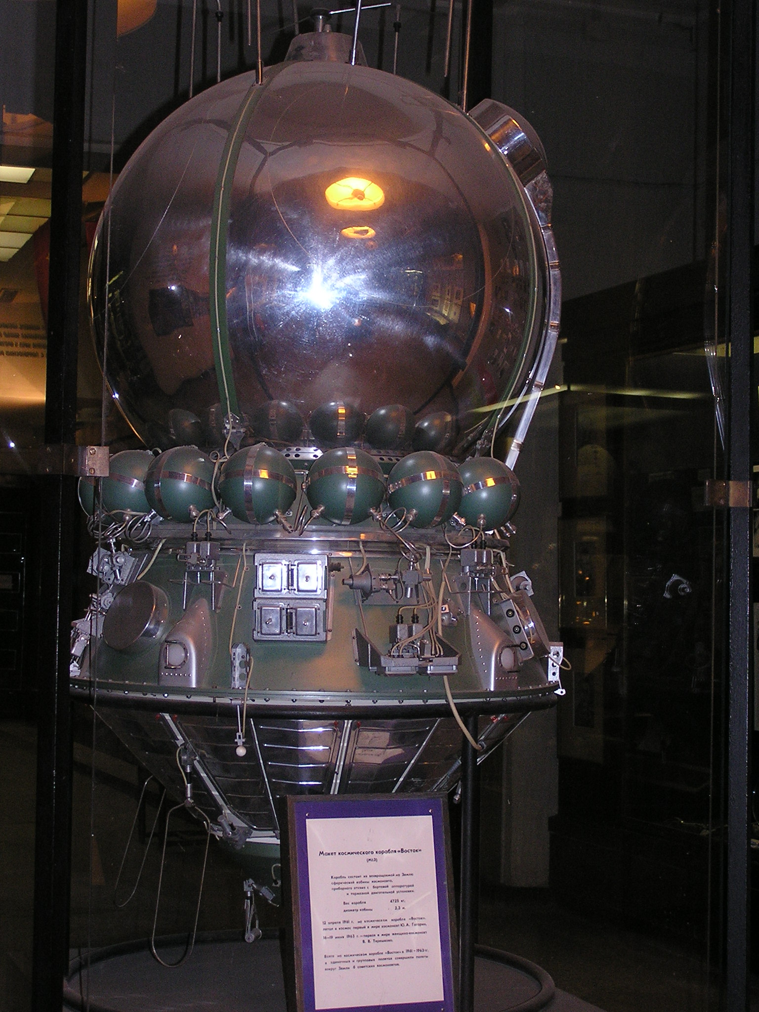 Музей космонавтики и ракетной техники (в Иоанновском равелине Петропавловской крепости). Макет космического корабля Восток This photograph was taken in Museum of Space and Missile Technology (Saint Petersburg) Object location59° 57′ 07″ N, 30° 19′ 16″ E